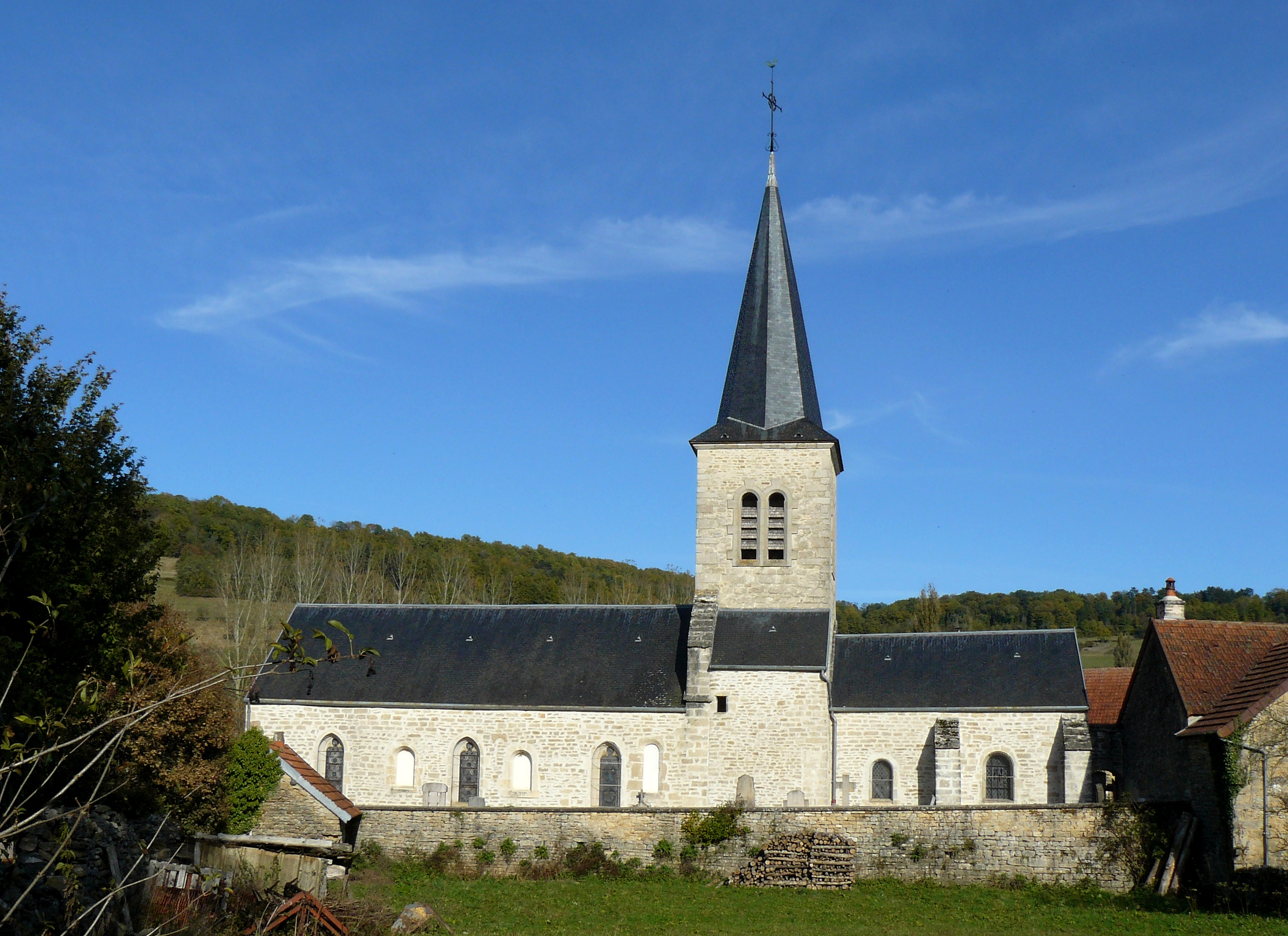 L'église de Jailly-les-Moulins (Côte d'Or) France